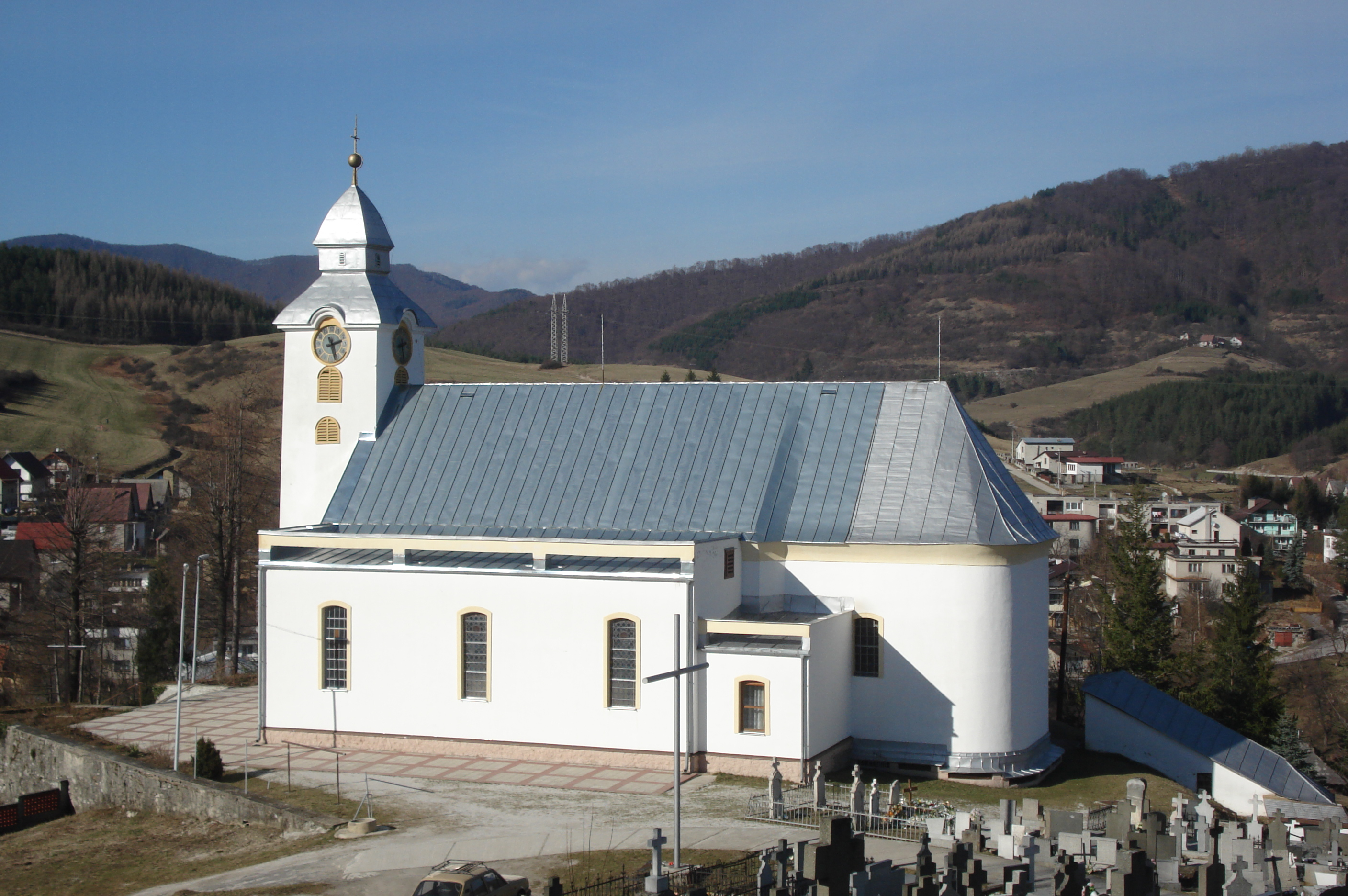 foto kostol Valaska Bela